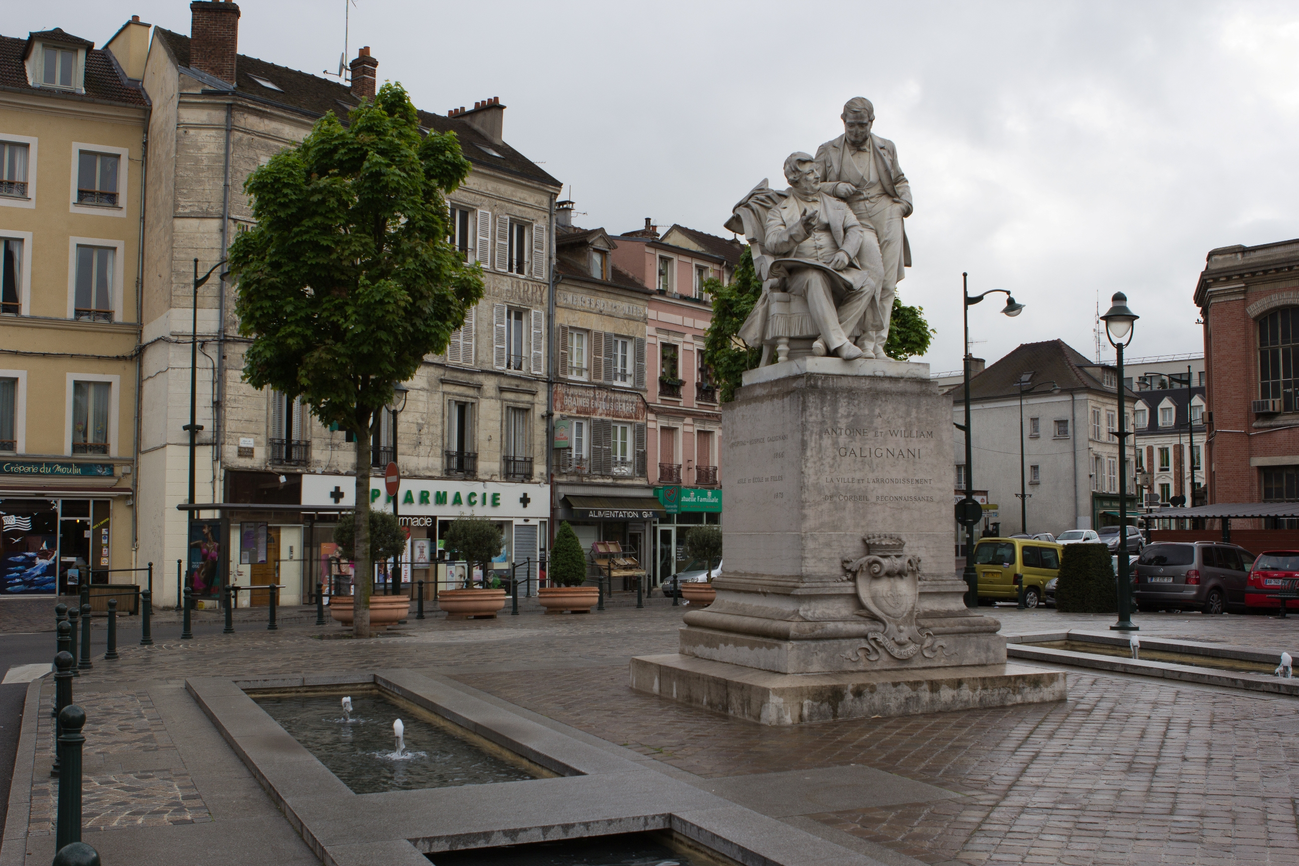 Place Galignani à Corbeil-Essonnes (Essonne, France)